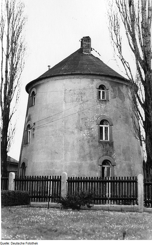 Original image description from the Deutsche FotothekCoswig-Brockwitz. Turmholländermühle, Mühlenhügel 22